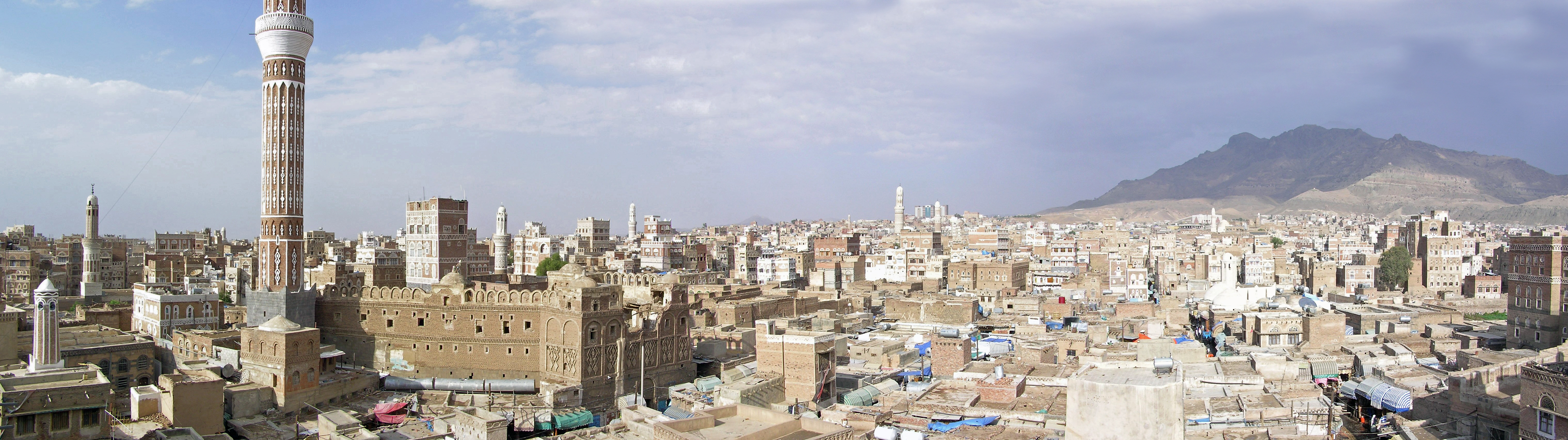 Yémen - Sana'a - Vue générale sur la ville et le Djebel Ayban